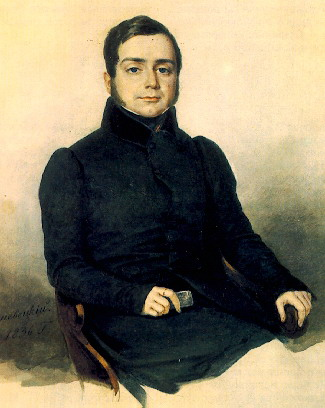 Всеволожский Никита Всеволодович